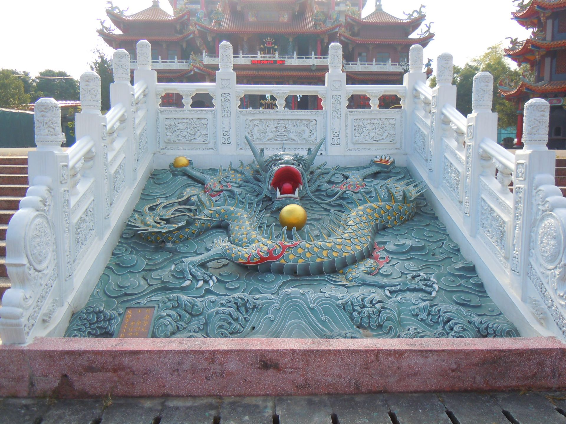 中文（中国大陆）: 慈善宮的地址:南投縣南投市。